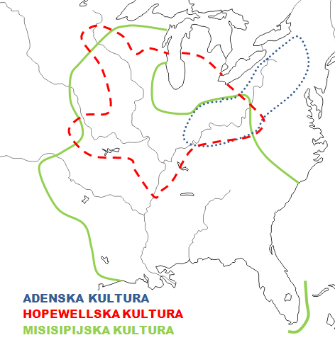 Območja treh kultur Graditeljev gomil